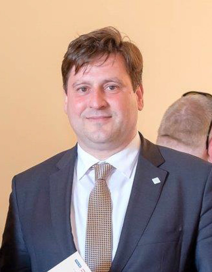 Bezirkshauptfrau Mag. Verena Sonnleitner,Landtagspräsident Karl Wilfing, Bgm. Dipl.-Ing. Stefan Szirucsek, Kultur-StR Hans Hornyik bei der Eröffnung der Baden Zentrum der Macht 1917-1918 im Kaiserhaus Baden